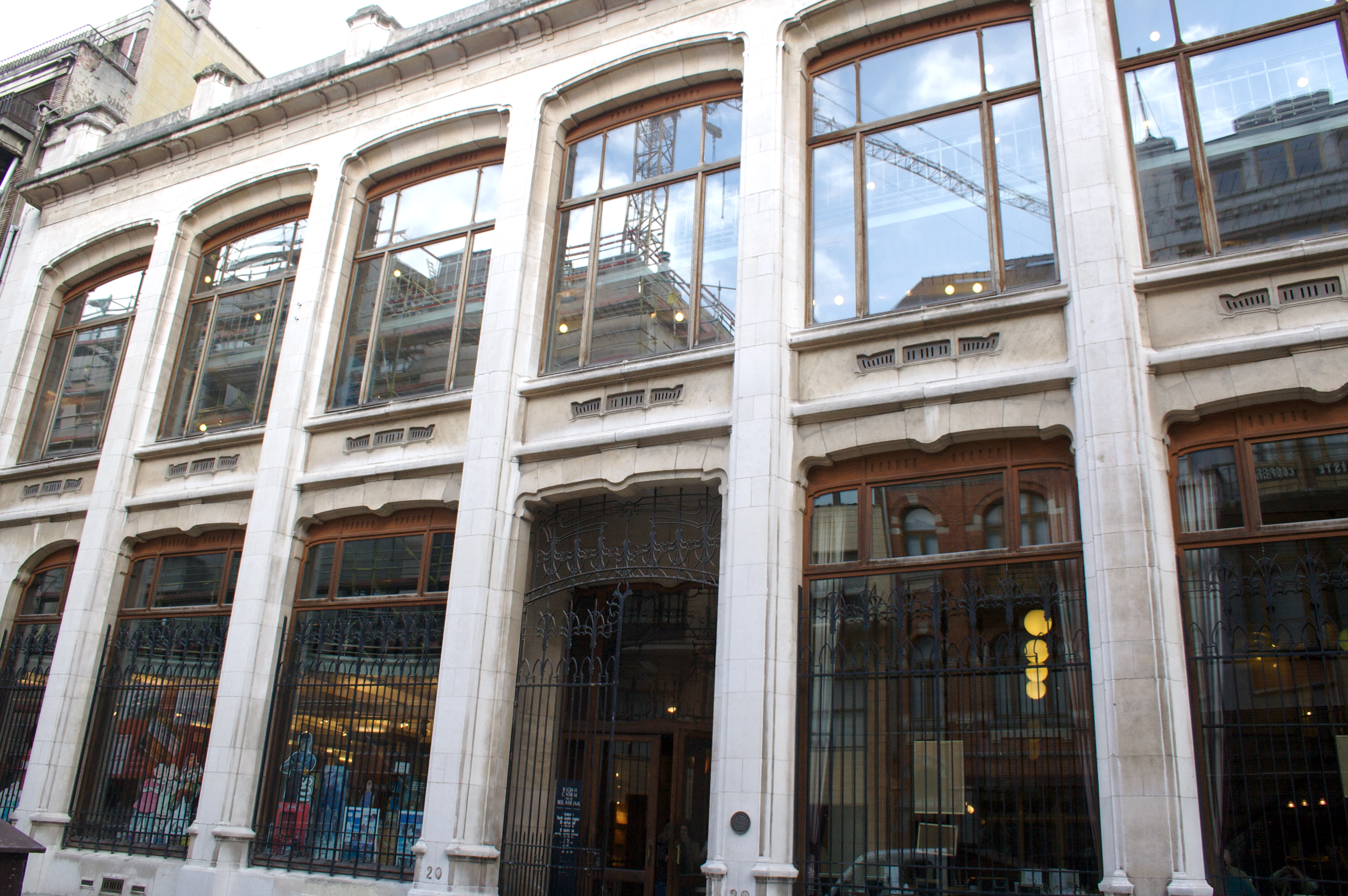 Conocido como Cébébédé es un museo dedicado al comic destacando la sección sobre Tintín El edificio que alberga el museo es obra de Víctor Horta diseñado en Art Nouveau construído entre 1903 y 1906.